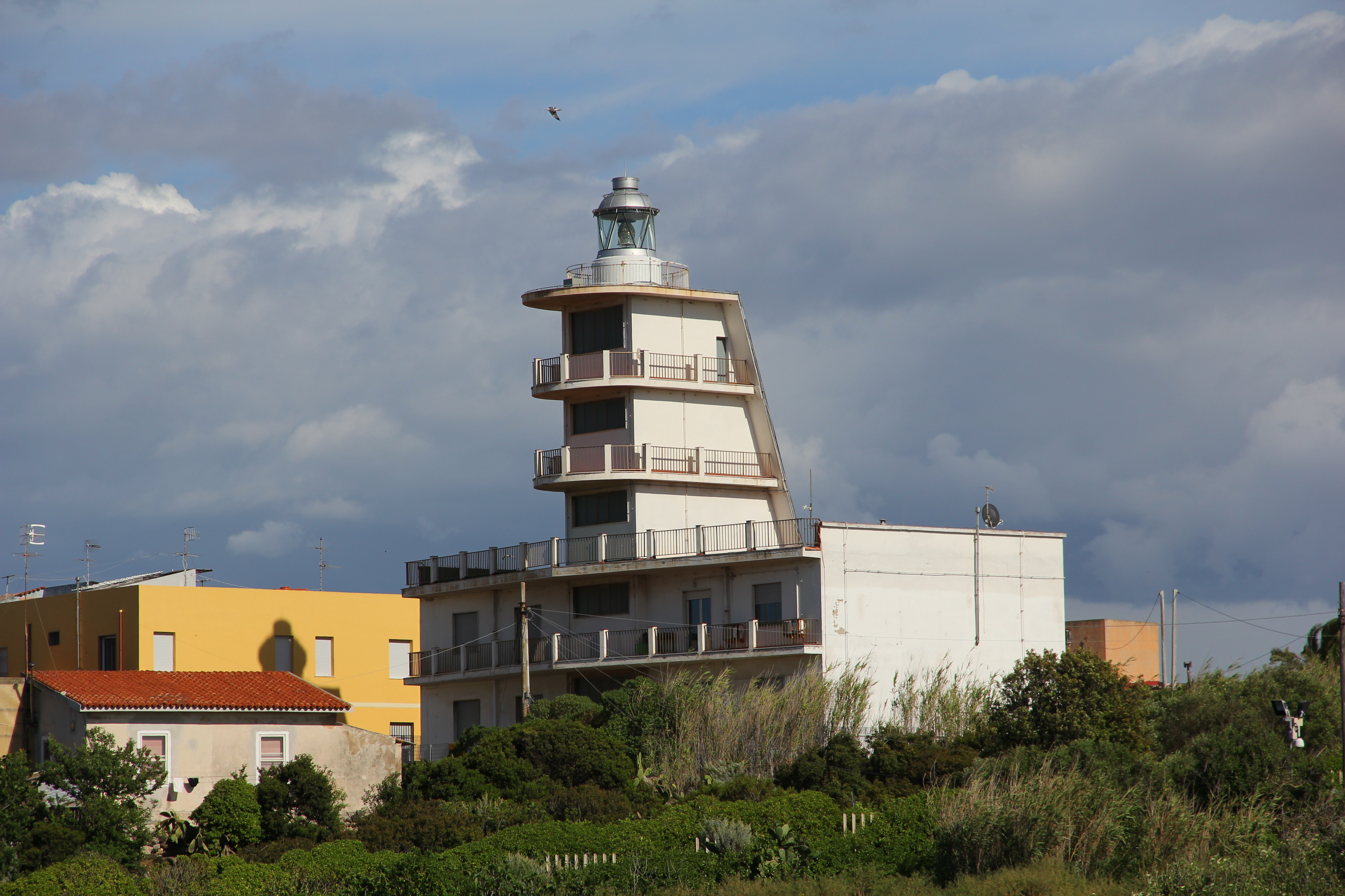 Porto Torres - Il faro